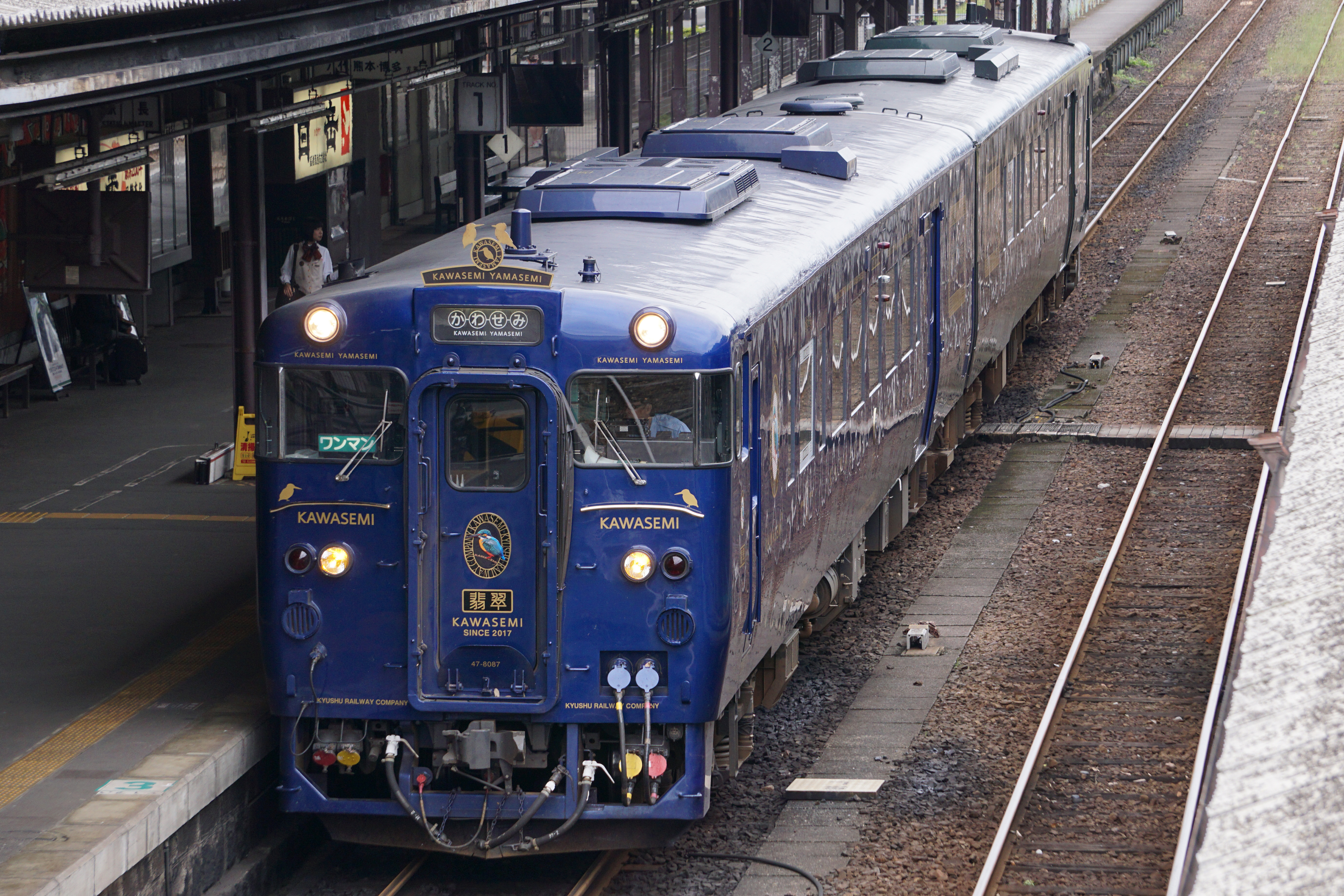 kawasemi yamasemi